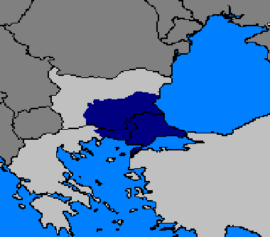 Тракия